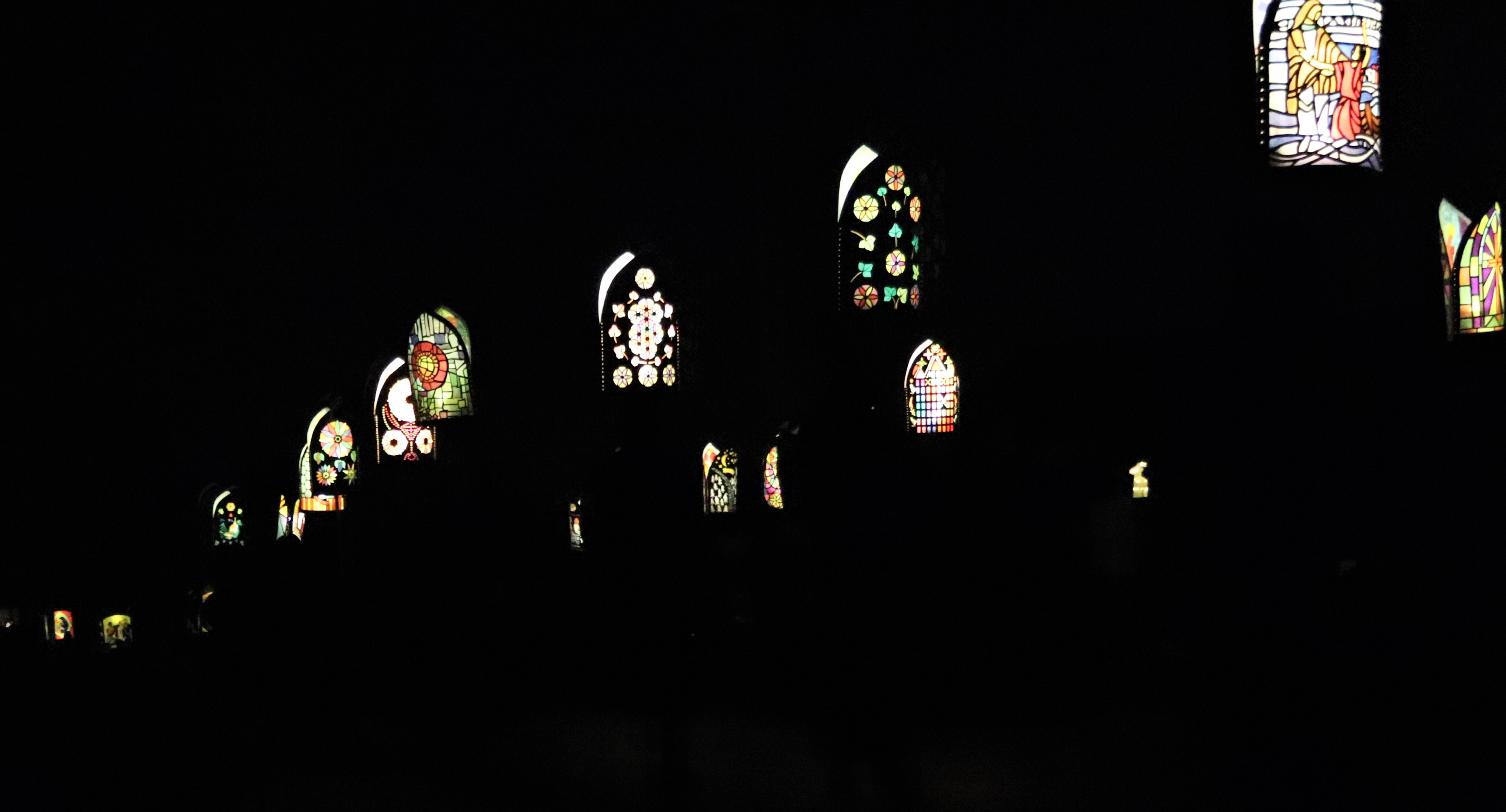 Yffeln der Zuger St. Niklausgesellschaft am Chlauseinzug 2019.